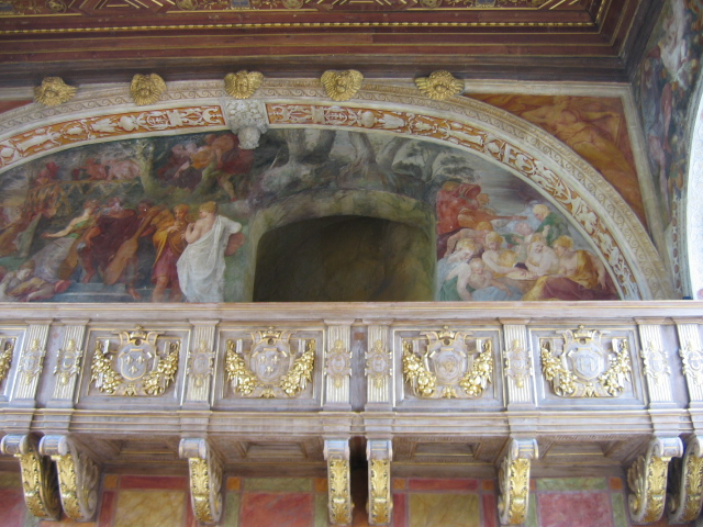 Salle de Bal